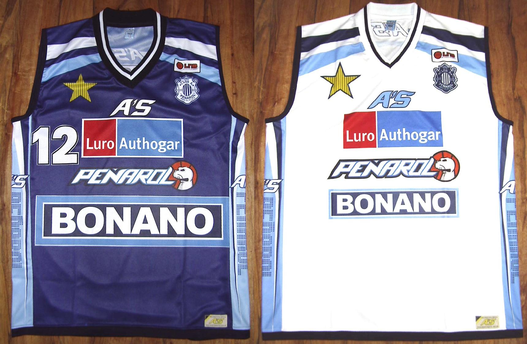 Camisetas oficiales para la temporada 2006-2007, en sus dos alternativas para los juegos de local y visitante, respectivamente